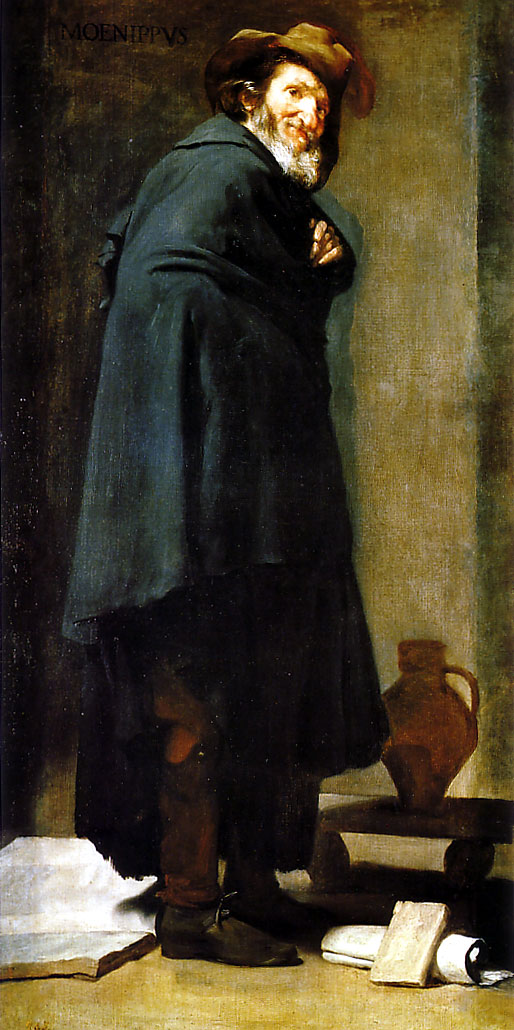 La obra representa al filósofo y escritor griego Menipo de Gadara, y fue ejecutada por el pintor sevillano Diego Velázquez hacia 1638.